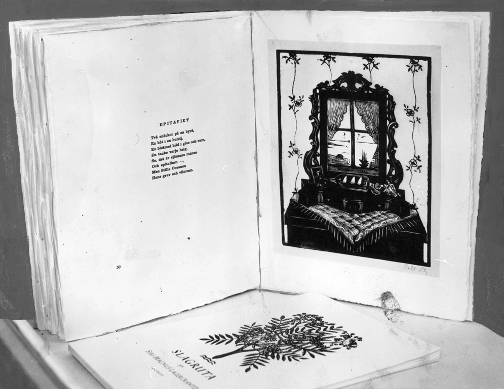 Ett träsnitt av Siri Magnus-Lagercrantz i hennes bok "Slagruta". Nationalmuseum presenterade på fredagen två nya utställningar, dels svensk bokkonst 1937–1938 och dels nyförvärven under 1938 till museets avdelning för handteckningar och gravyrer. Bokutställningen, som omfattar 35 böcker från de senaste två årens produktion, är den femte i sitt slag. Det är emellertid första gången som två hela års produktion av böcker medtagits, men experimentet har medfört så stora olägenheter att man kommer att återgå till de årliga urvalen.